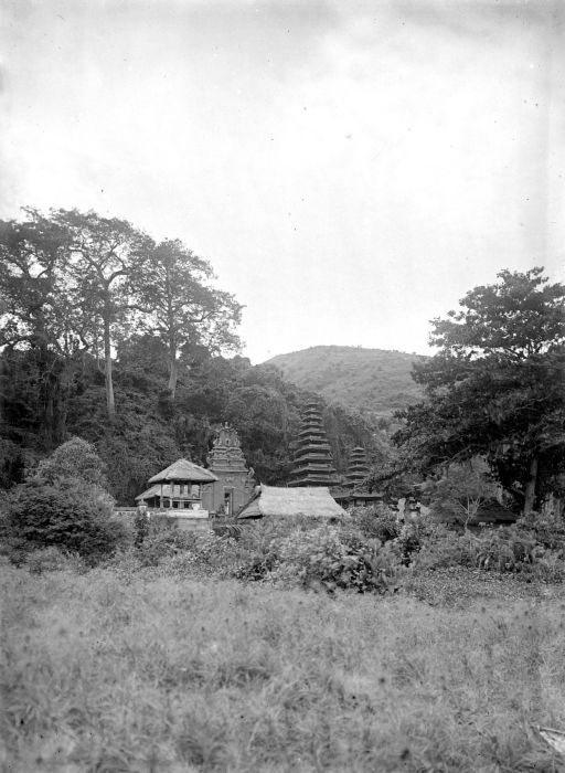 Negatief. De Pura Goa Lawa of Vleermuizengrot bij Koesamba